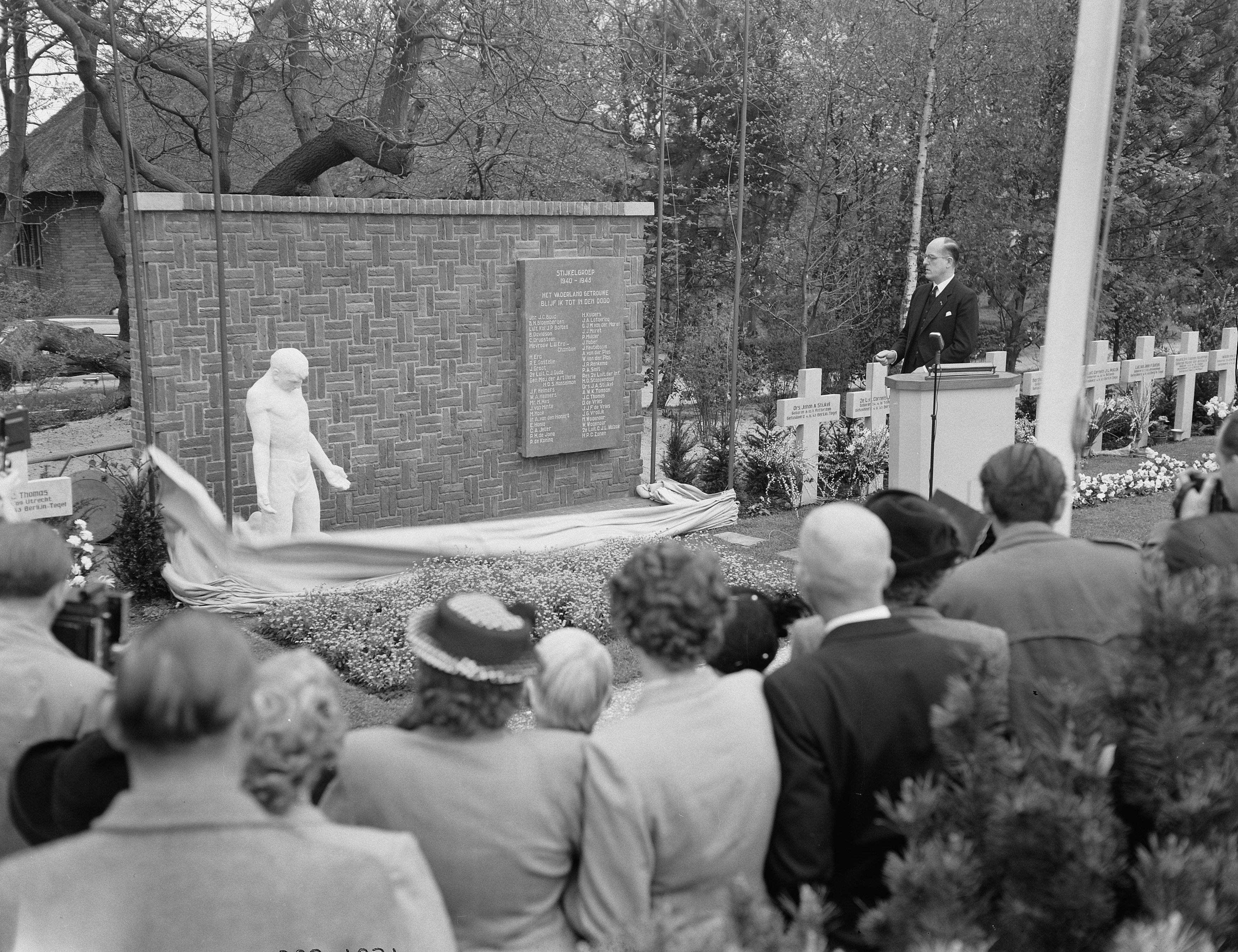 Collectie / Archief : Fotocollectie Anefo Reportage / Serie : [ onbekend ] Beschrijving : Dodenherdenking, op de begraafplaats Westduin in Den Haag wordt een eregraf c.q. monument voor de Stijkelgroep onthuld Annotatie : De Stijkelgroep is een verzetsgroep uit de Tweede Wereldoorlog Datum : 4 mei 1953 Locatie : Den Haag, Zuid-Holland Trefwoorden : dodenherdenkingen, onthullingen, oorlogsmonumenten Instellingsnaam : Stijkelgroep Fotograaf : Duinen, […] van / Anefo, [onbekend] Auteursrechthebbende : Nationaal Archief Materiaalsoort : Negatief (zwart/wit) Nummer archiefinventaris : bekijk toegang 2.24.01.04 Bestanddeelnummer : 905-7037